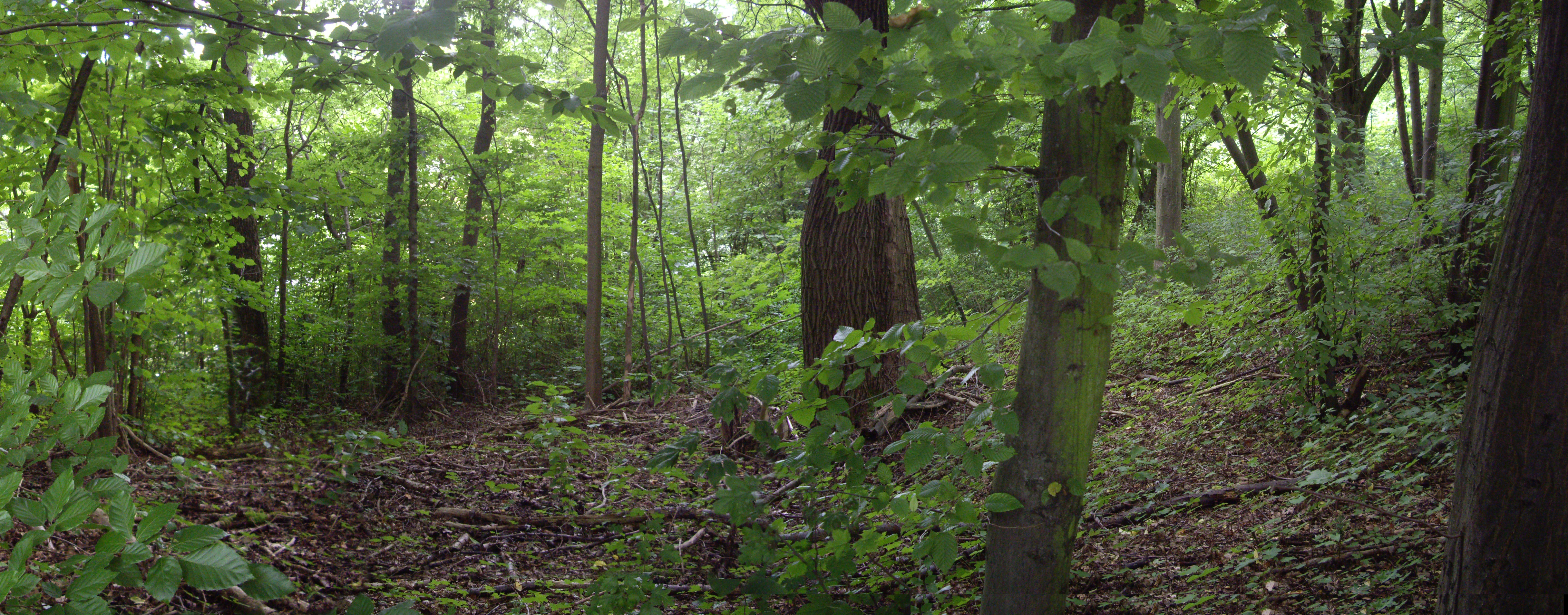 Blick vom Habichtsweg in das Waldgebiet auf dem IWF-Gelände, Nonnenstieg 72, Göttingen. Dieses Waldgebiet wurde im Frühjahr 2016 in seinem naturnahen Charakter weitgehend zerstört. Foto: F. Welter-Schultes.